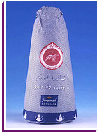 pain de sucre